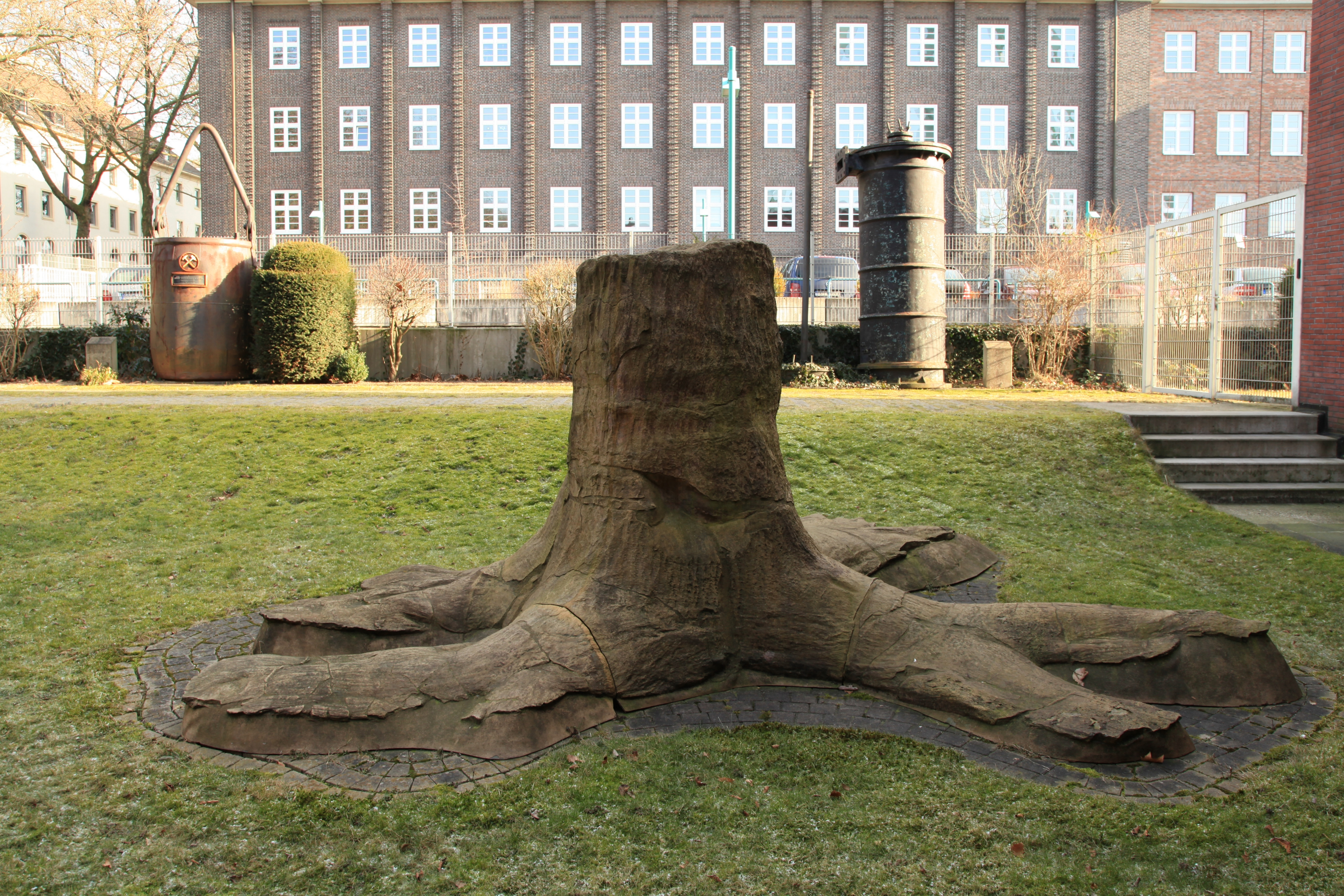 Deutsches Bergbaumuseum, Am Bergbaumuseum in Bochum